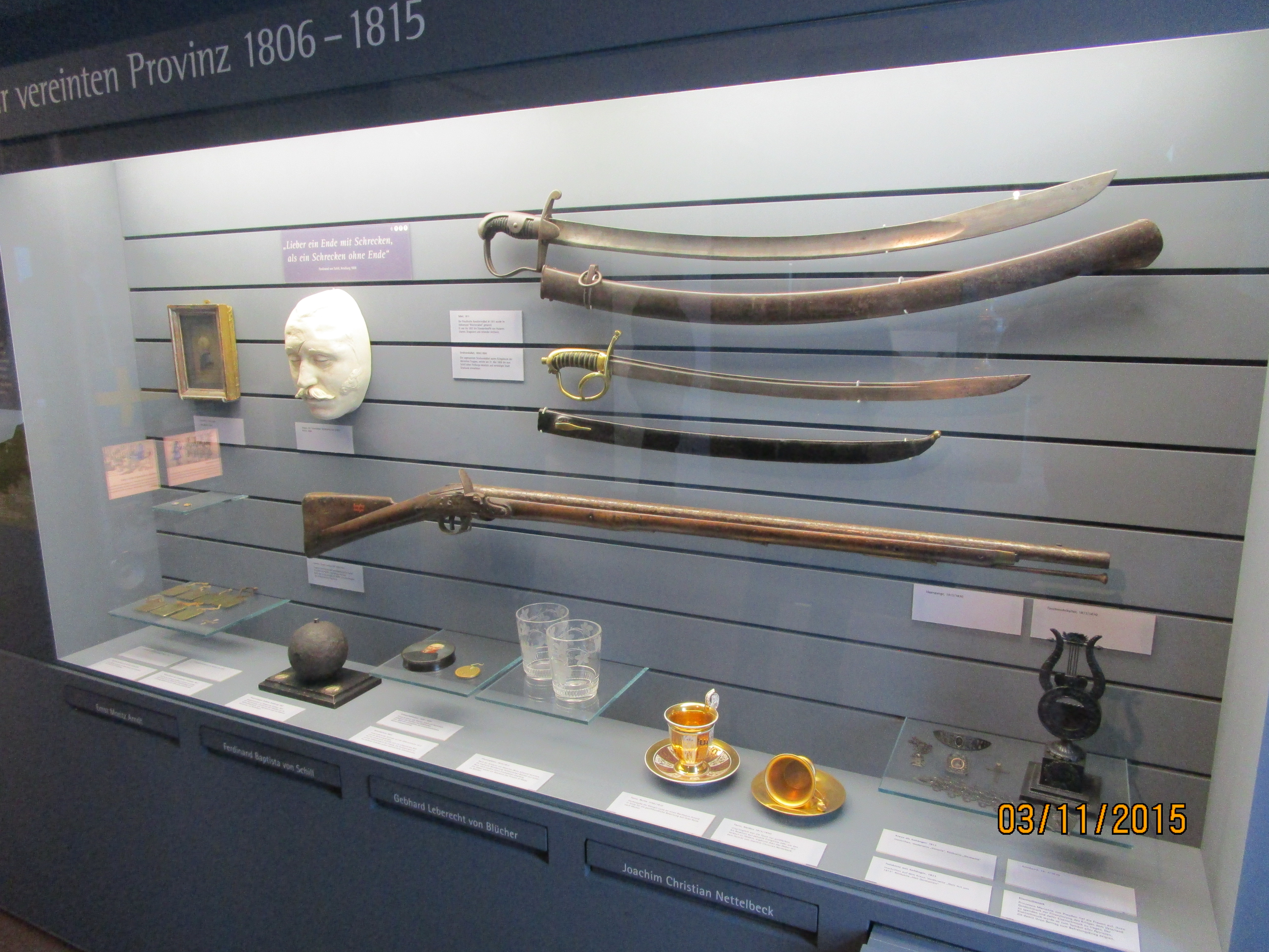 Geschichtliche Abteilungen des Pommerschen Landesmuseums